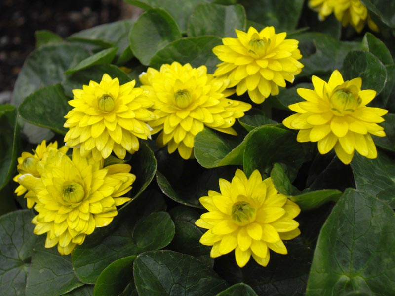 Ranunculus ficaria 'Flore pleno'